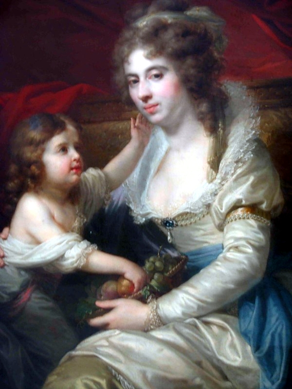 Лампи И. 1751-1830 Графиня Вера Николаевна Завадовская, ур. Апраксина с дочерью Татьяной. Музей искусств Узбекистана. Из коллекции Великого князя Николая Константиновича Романова - наместника царя в Туркестане